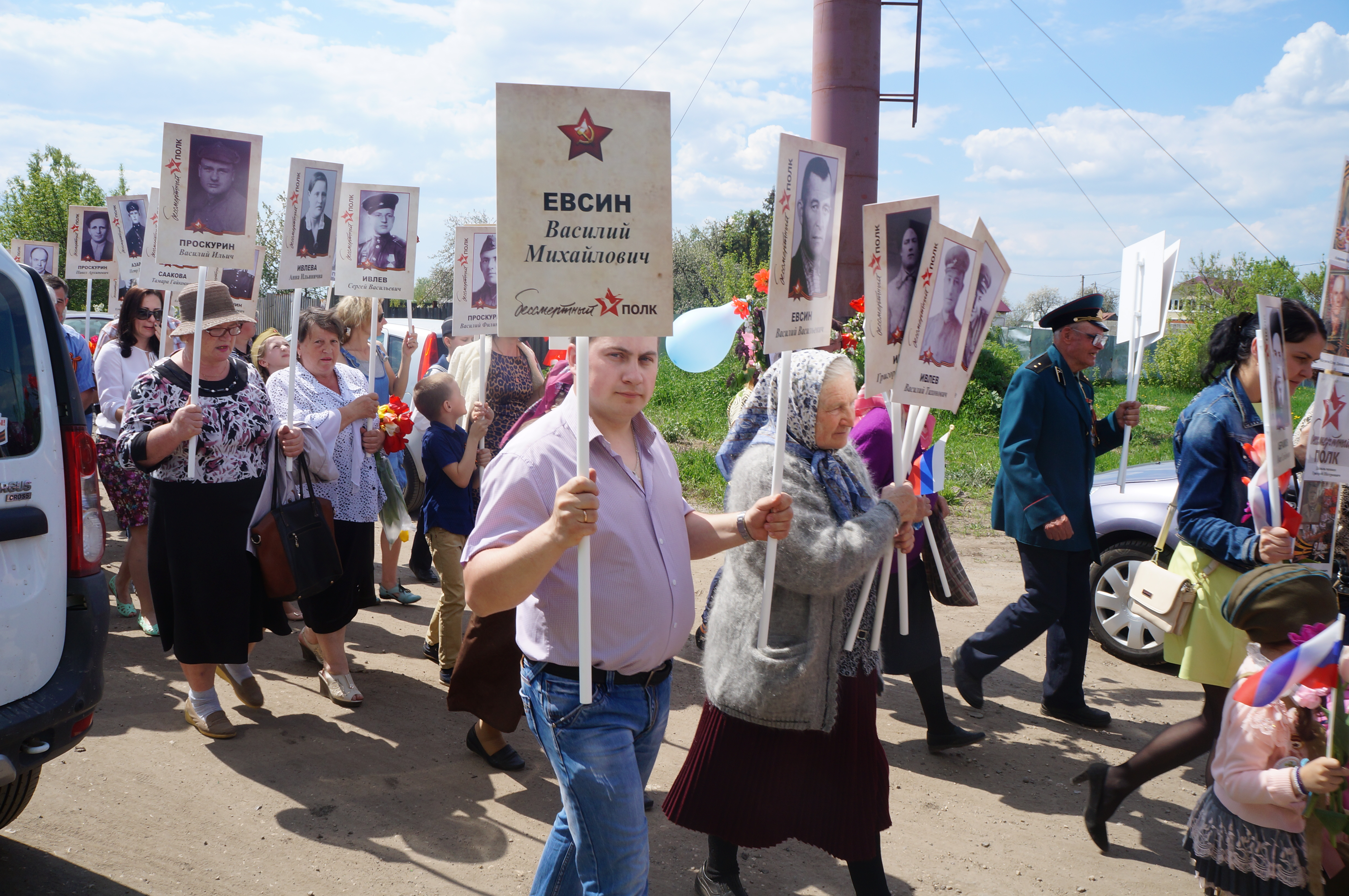 9 мая 2016 г.